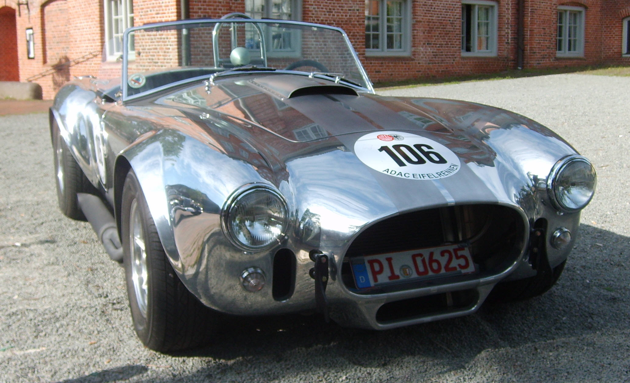 Shelby Cobra 427 SC, 8 Zylinder, 6998 ccm, 435 PS Baujahr 1965 bei der Pinneberg Mobil